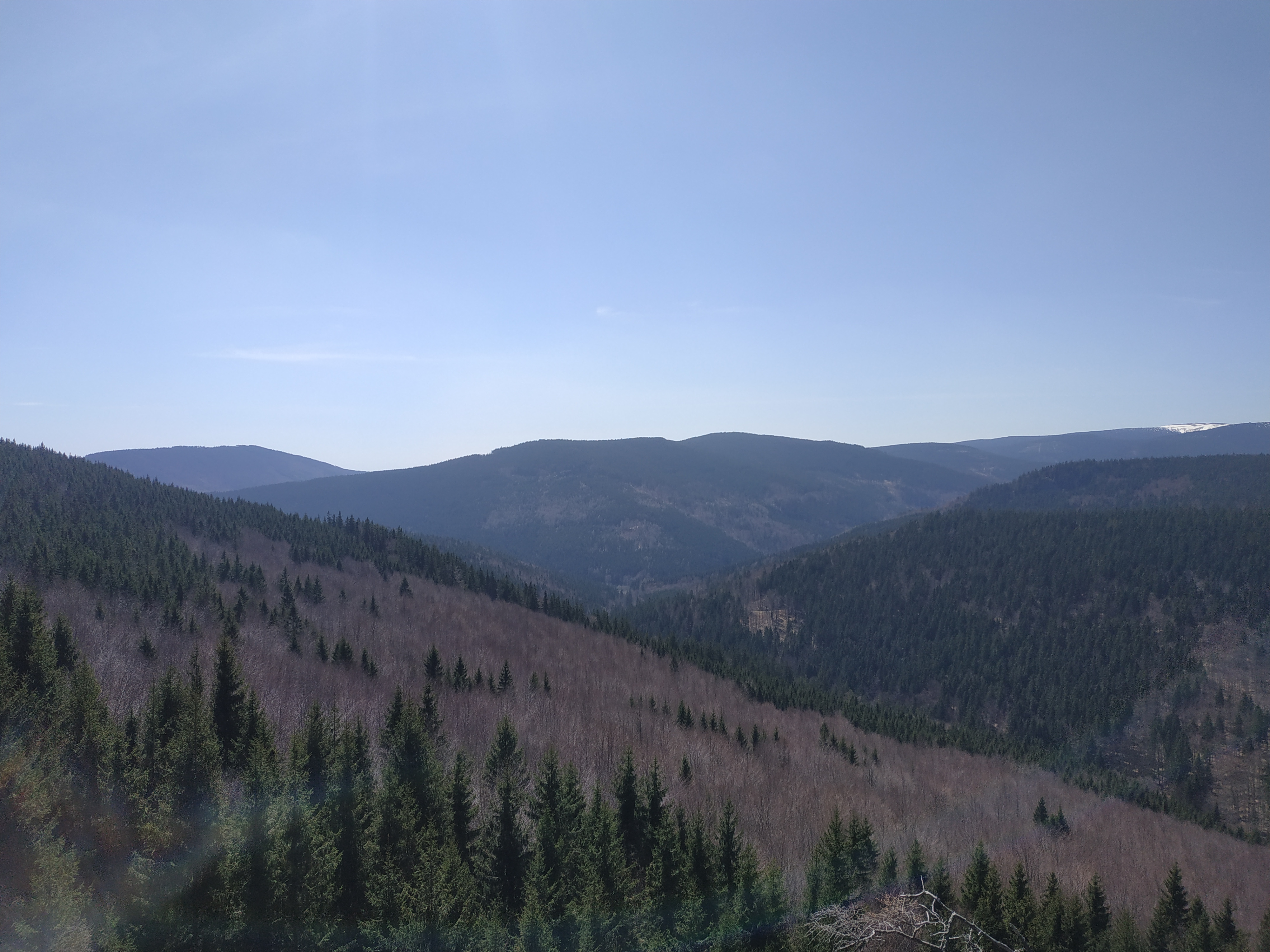 Vrbenská vrchovina od Kamzičích skal nad Bílým Potokem (Vrbno pod Pradědem)